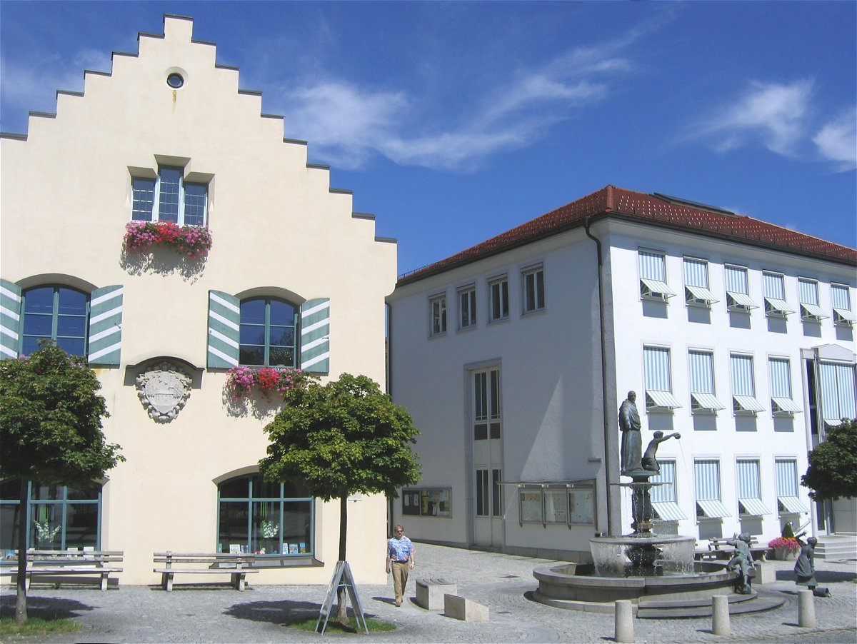 Holzkirchen-Marktplatz, altes Rathaus (links), heute öffentlich Bücherei, neues Rathaus (rechts)